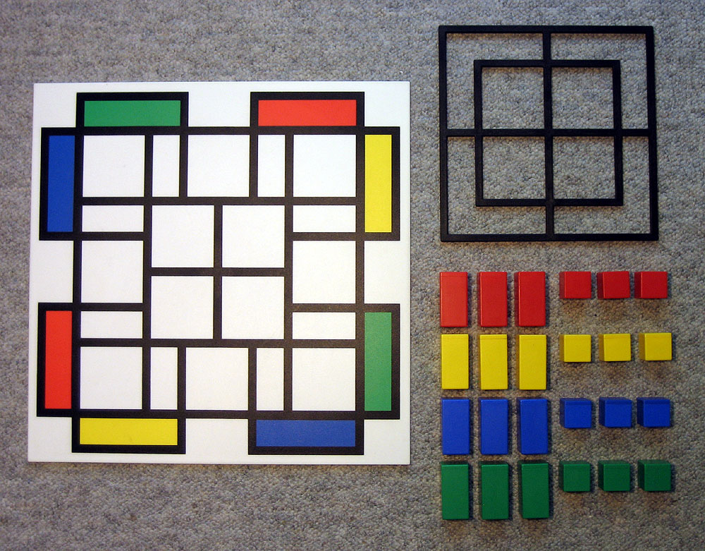 Ido Game / Ido Spielmaterial